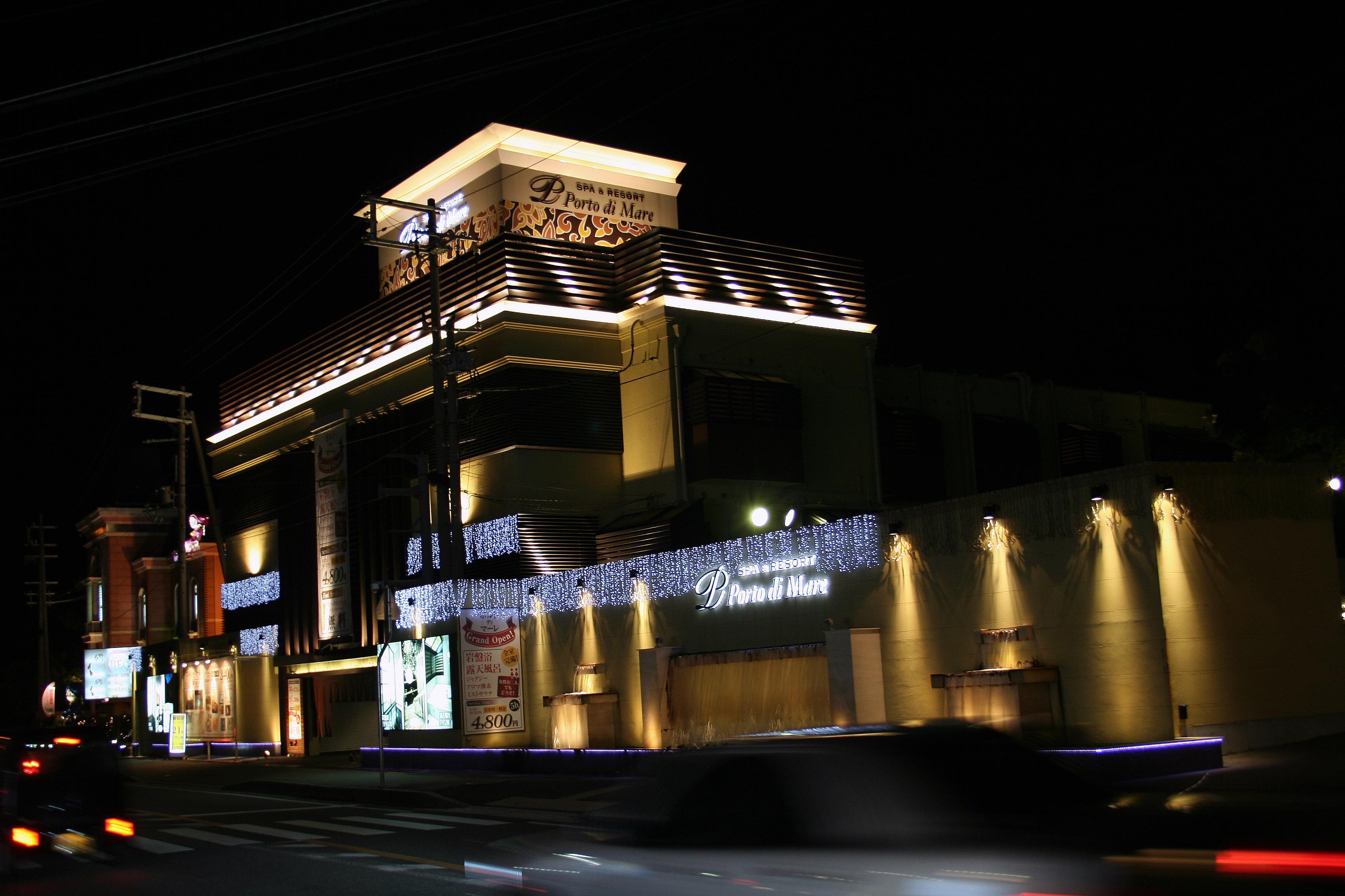 ホテル ポルトディマーレ。 姫路東ランプ北側に集まるラブホテルのうちの一つ。